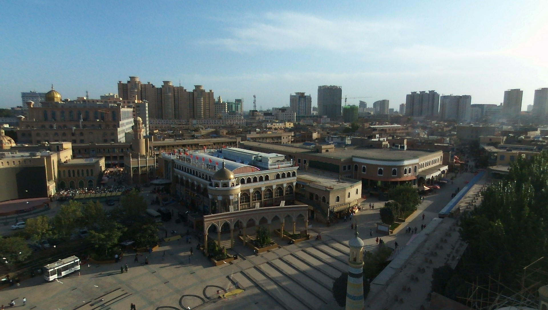 Ten materiał wykonano dronem Parrot Bebop Drone dzięki współpracy z firmą Parrot Polska.Materiały wykonane tym sprzętem możesz zobaczyć w kategorii: Taken with Parrot Bebop Drone. English | polski | +/− The making of this document was supported by Wikimedia Polska. To zdjęcie zostało wykonane podczas Wikiwyprawy 2015.Wszystkie zdjęcia z wyprawy możesz zobaczyć w kategorii: Wikiwyprawa 2015. English | polski | +/− To zdjęcie zostało załadowane dzięki współpracy z firmą Hyperbook. polski | +/− To zdjęcie zostało załadowane dzięki współpracy z firmą: Kopex Group. English | polski | +/−